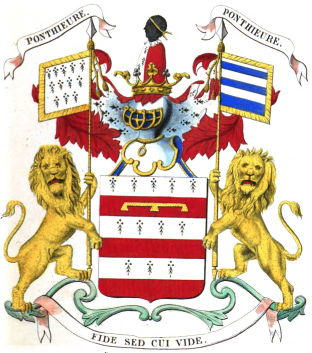 Armoiries de la famille de Berlaere